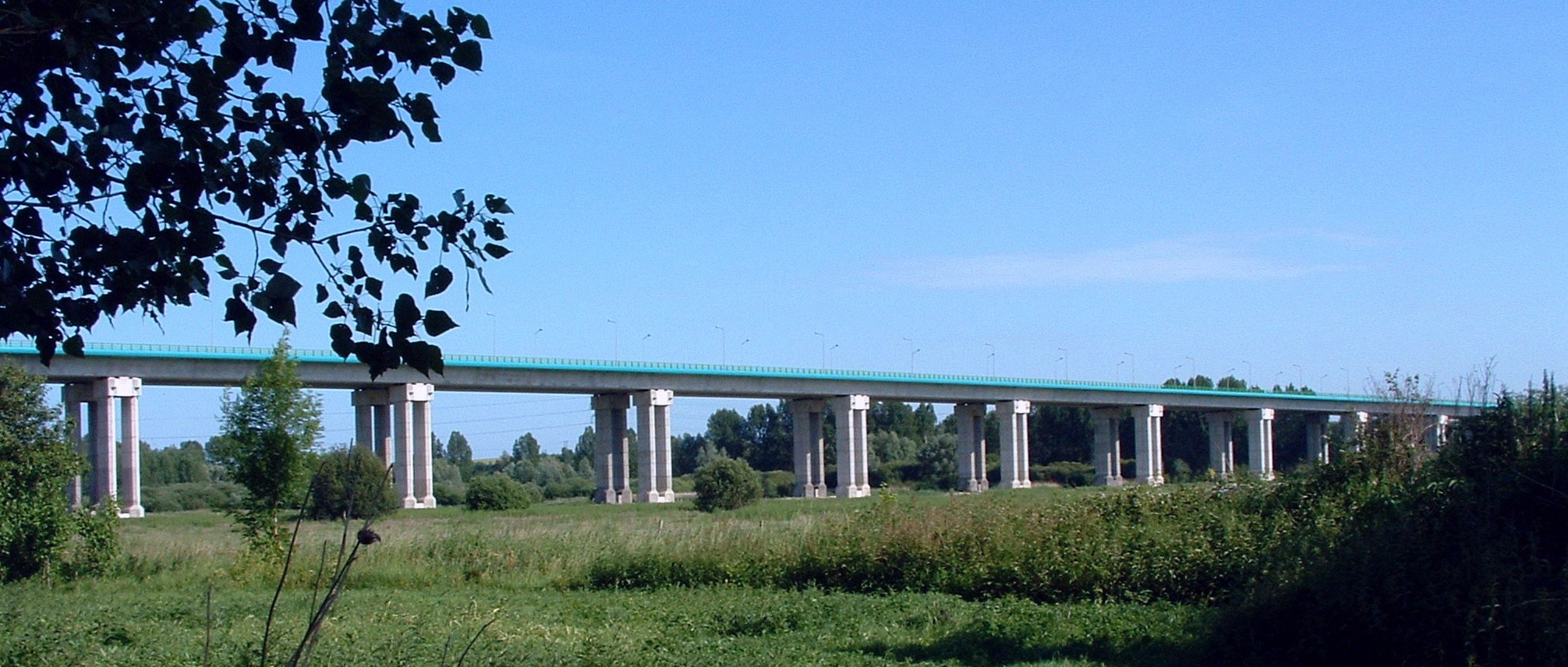 Viaduc Jules-Verne - Ensemble